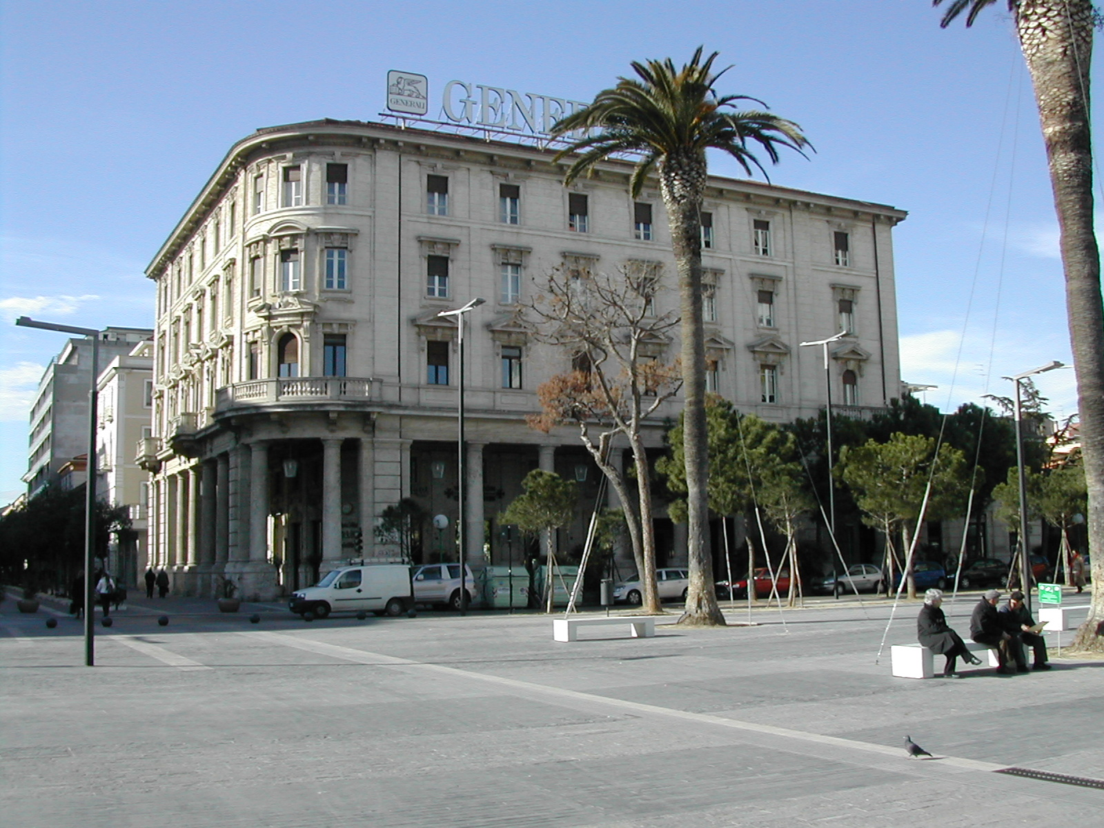 Piazza Salotto Pescara